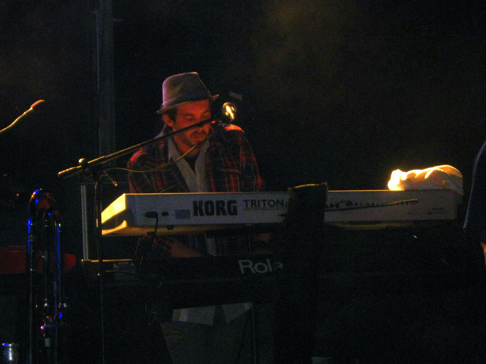 Recital en Pan de Azúcar, Maldonado, Uruguay en marzo del 2012